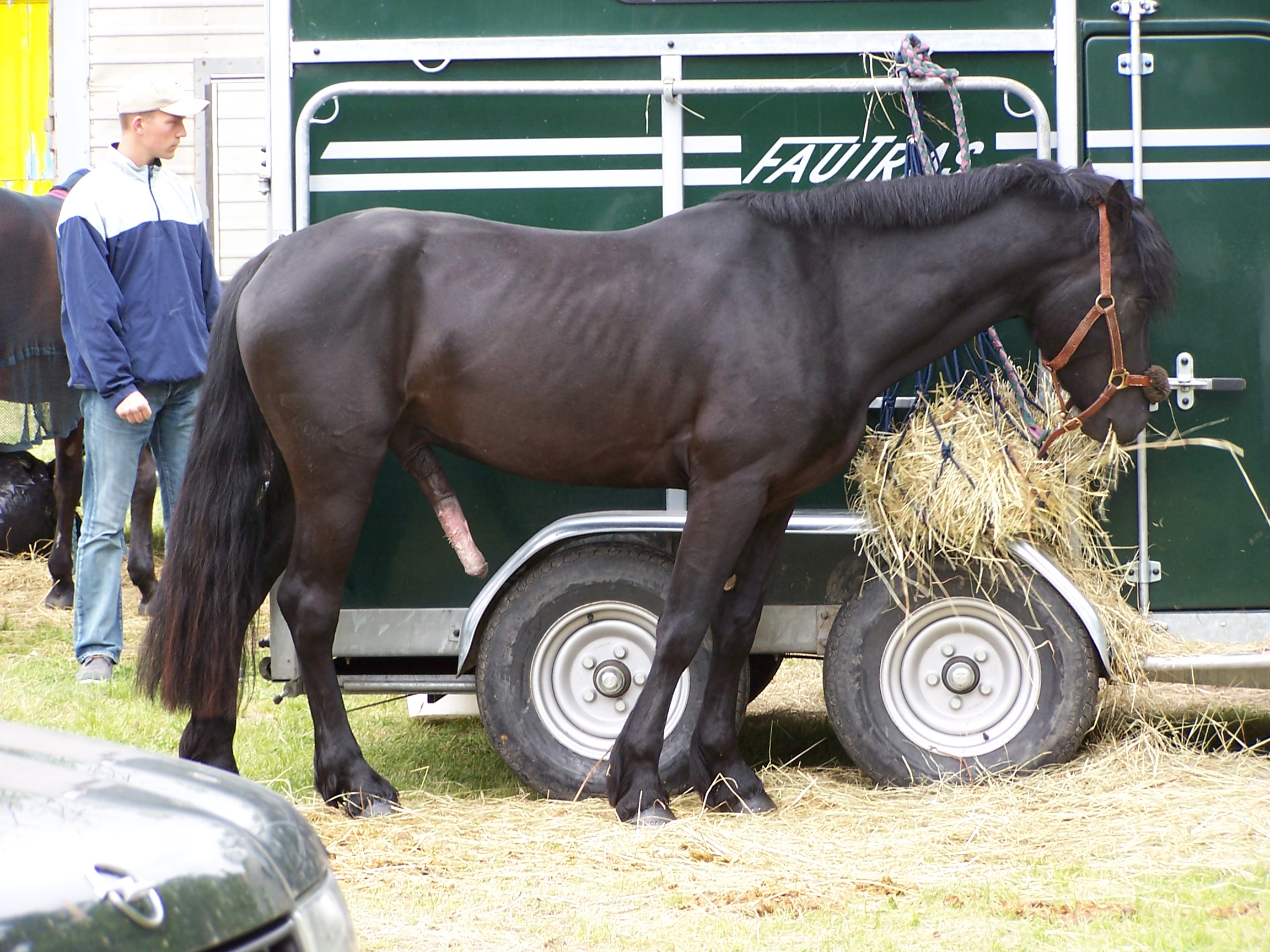 Photographie d'un cheval (Equus caballus). Le cheval est un grand mammifère domestique ongulé, de la famille des équidés.